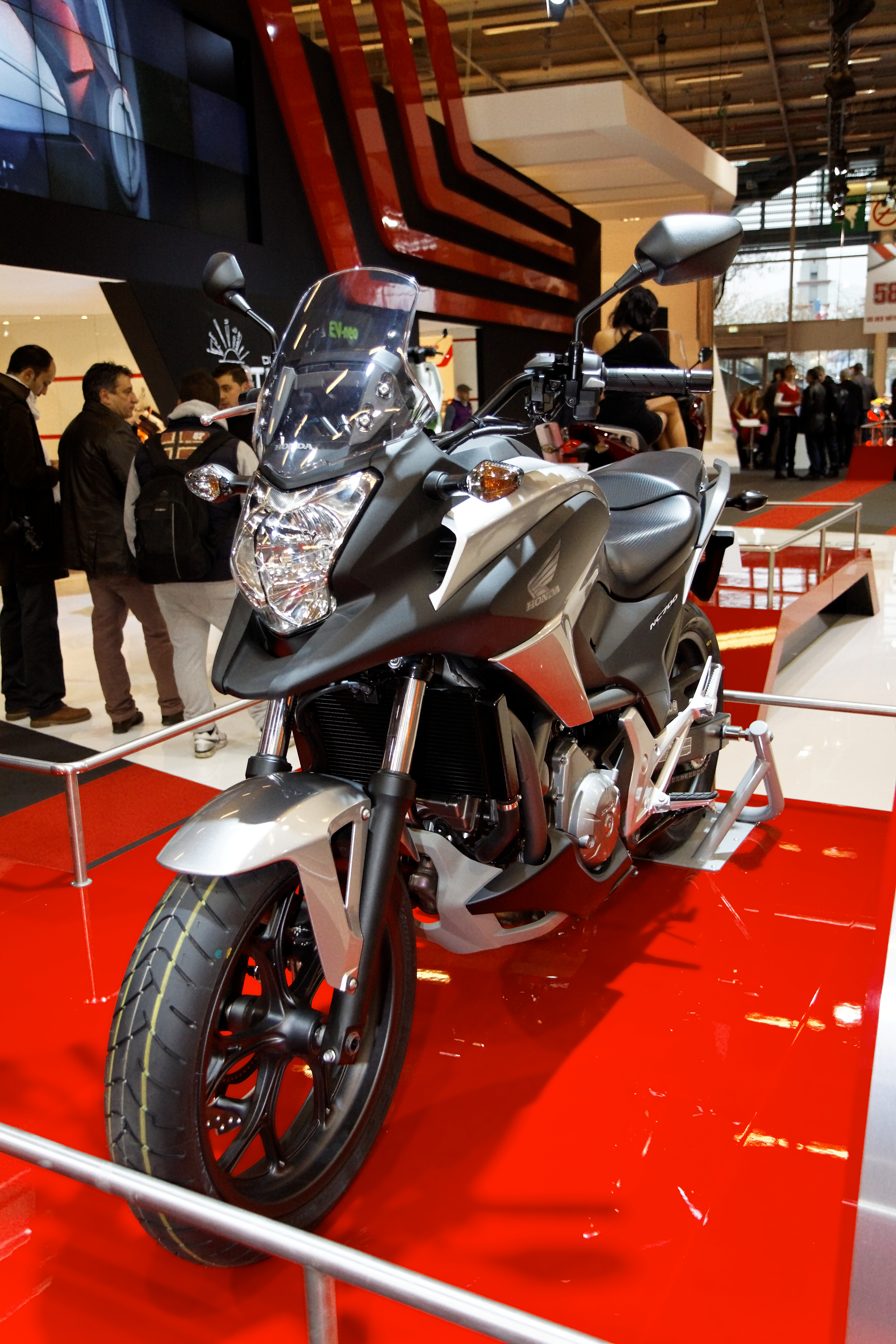 Honda - NC 700 S